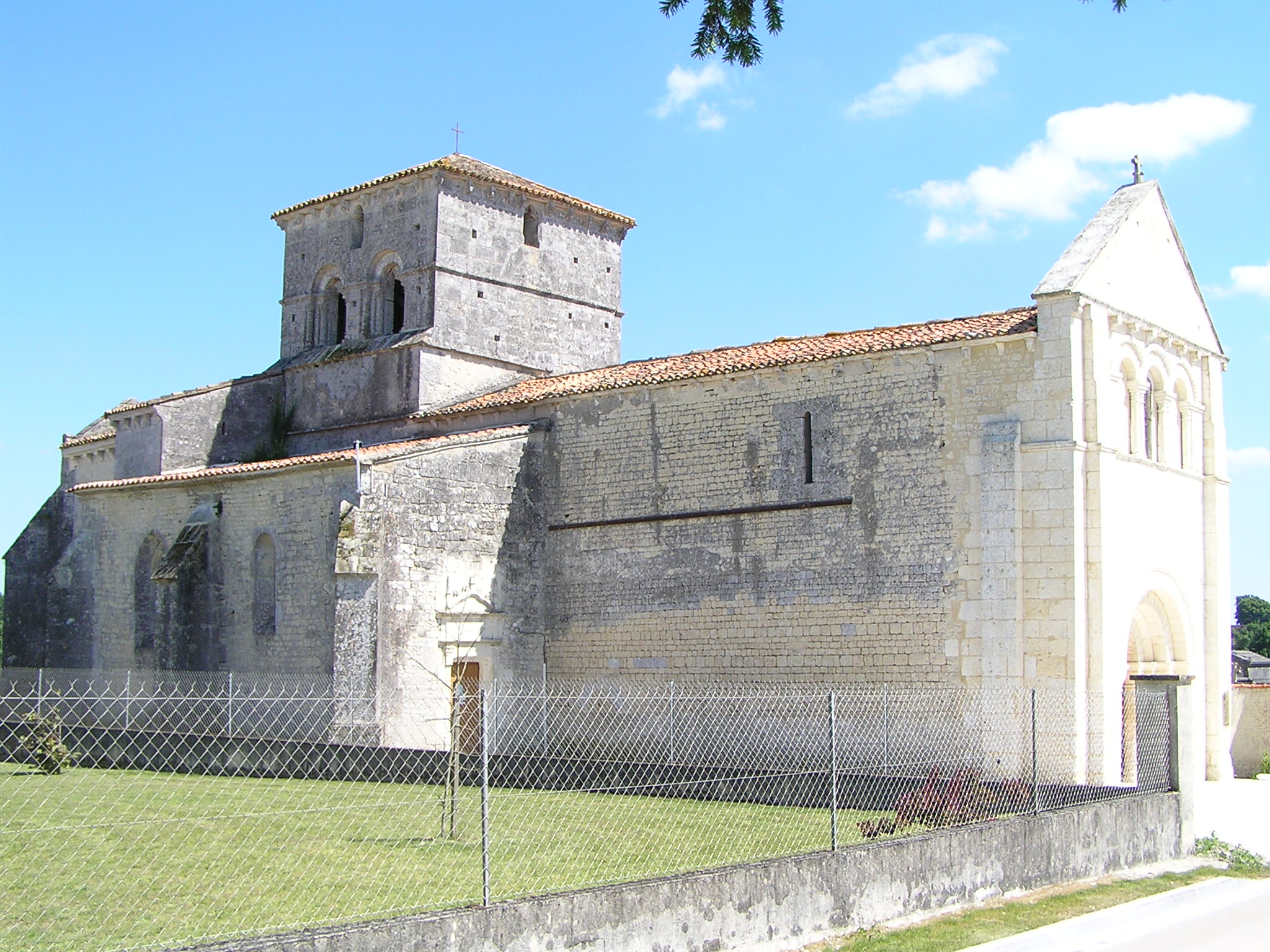 église d'Ambleville, Charente, France